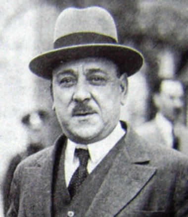 Атанас Буров